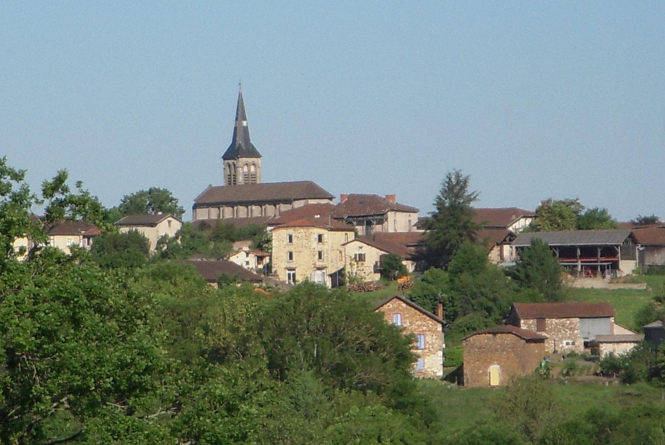 Montredon - Vue d'ensemble